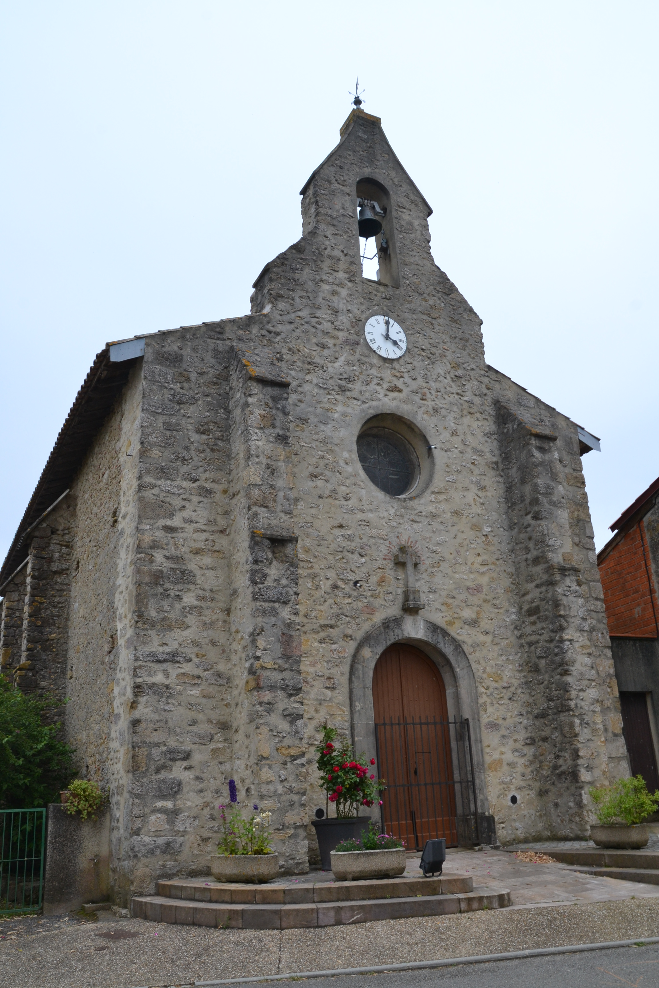 Eglise de Tourtrol (Ariège, France).